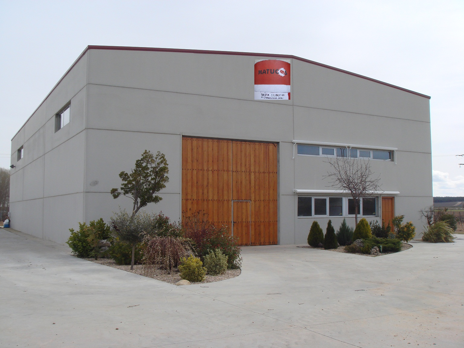 Fachada de la bodega Matucos dentro del término de San Martín de Rubiales